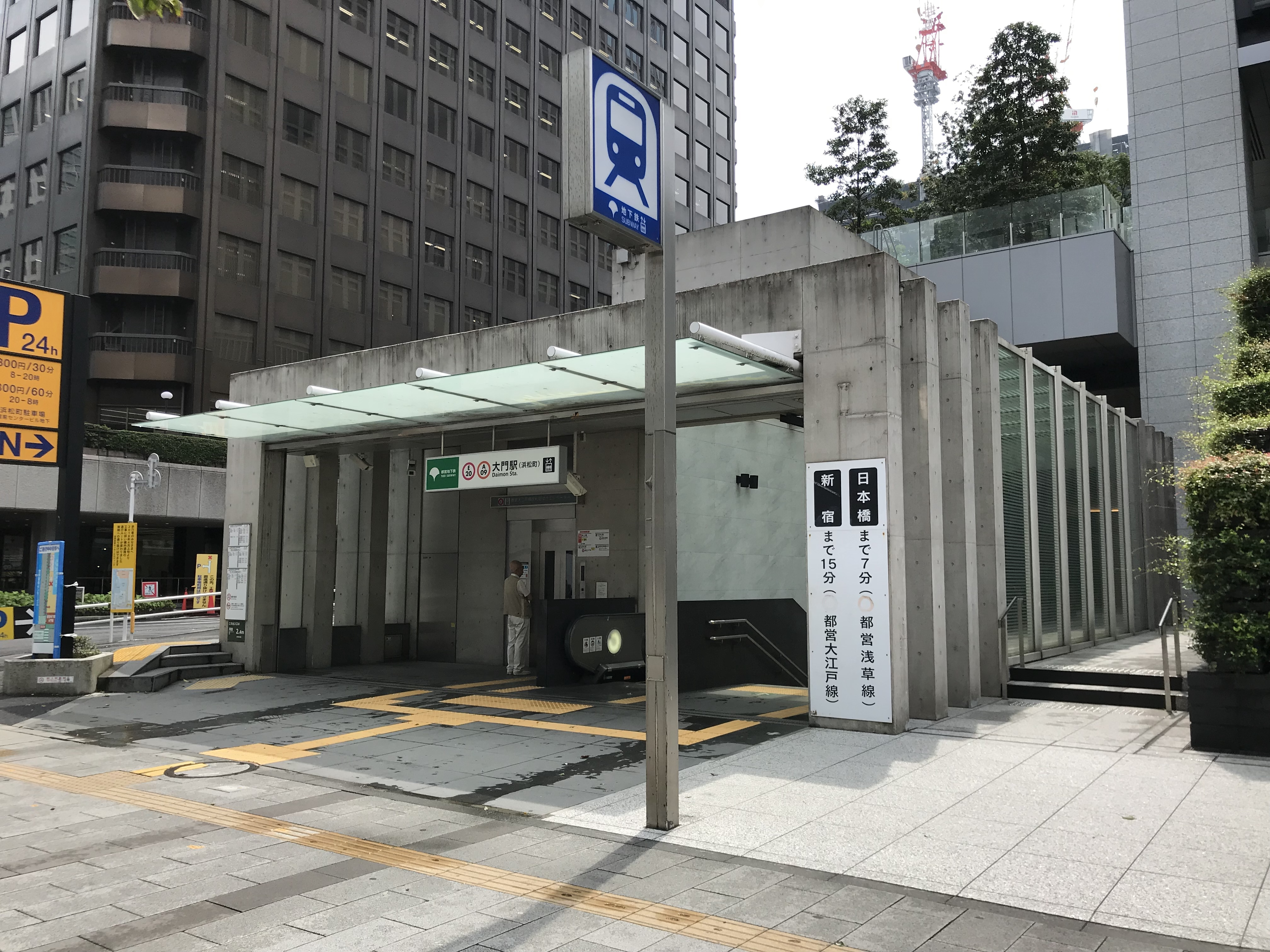 都営地下鉄浅草線・大江戸線大門駅B4番出入口